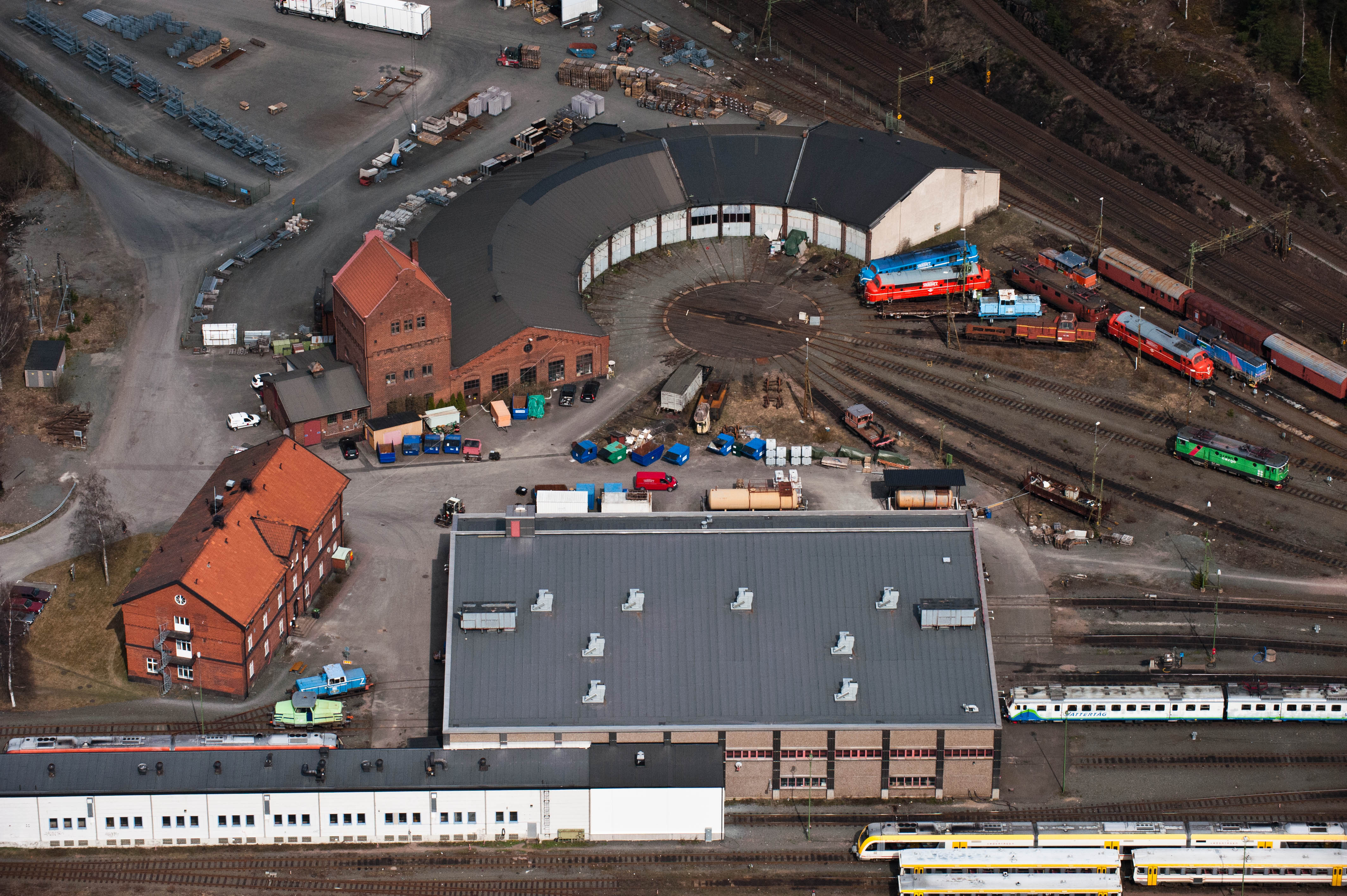 Nässjö lokstallar från luften